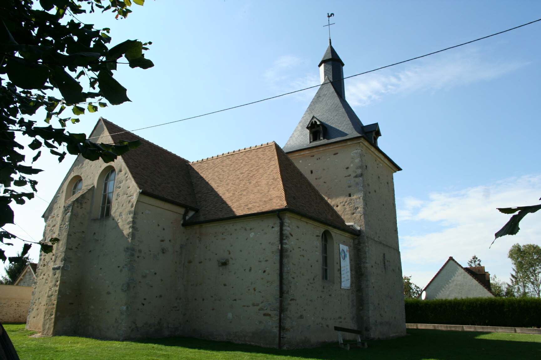 Église de Boinvilliers - Yvelines (France)